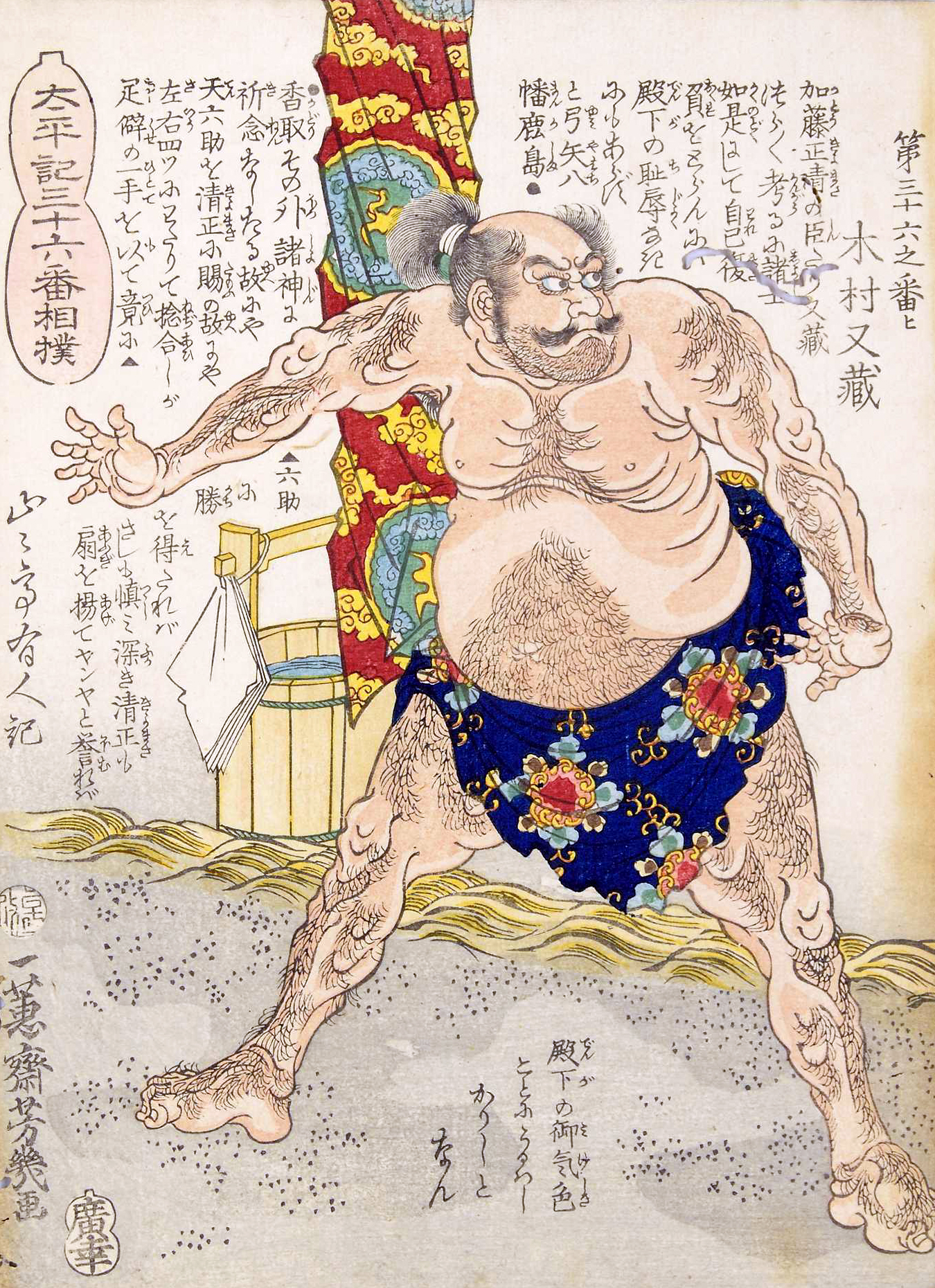 「太平記三十六番相撲・第三十六之番ヒ：木村又蔵」